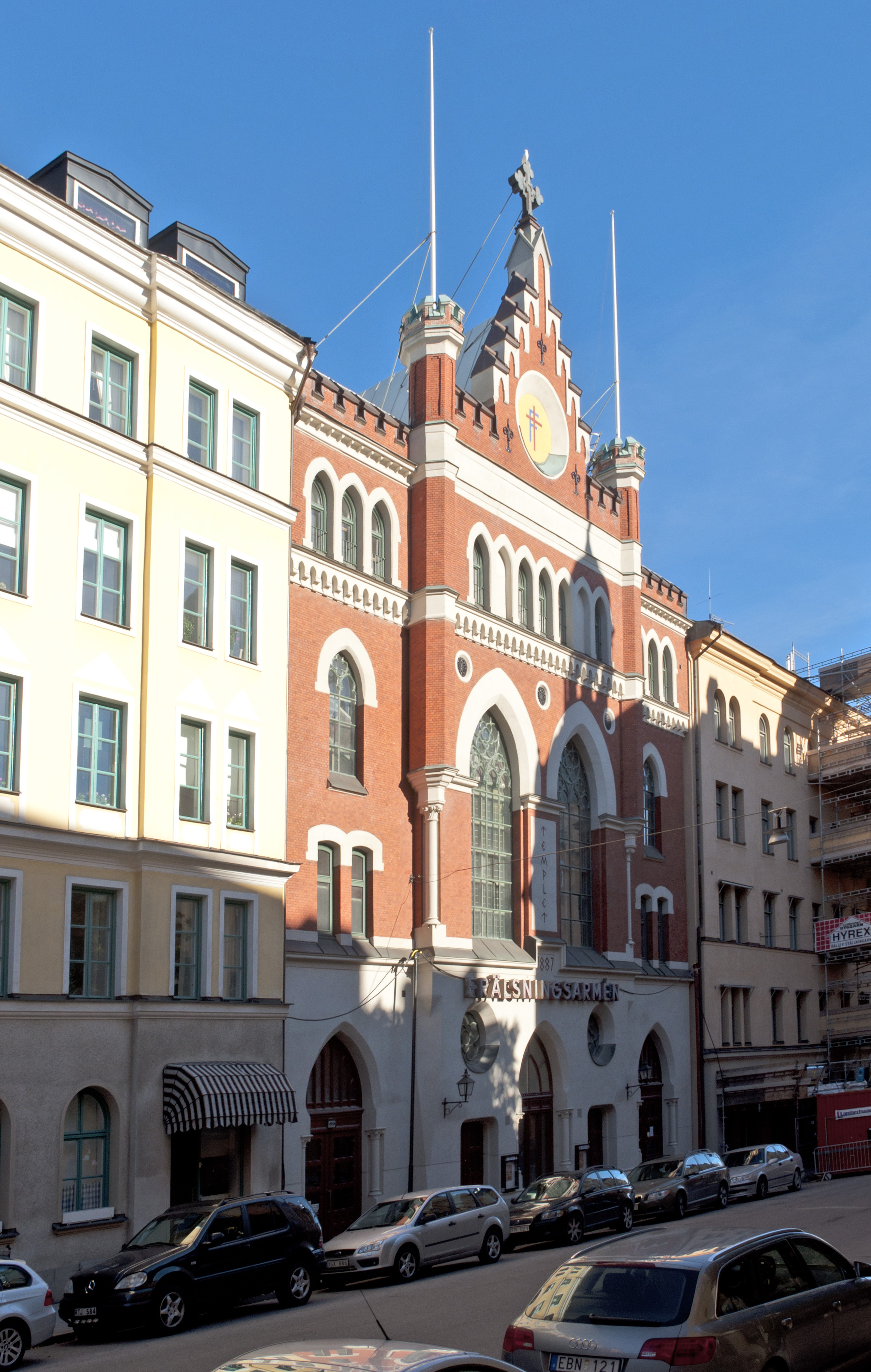 Östermalmsgatan 69, Frälsningsarméns tempel. Byggnadsår 1886-87, arkitekt Adolf Emil Melander (fasad) och Robert Alderin (övrigt) , byggherre Hanna Ouchterlony för Frälsningsarmén, byggmästare R Alderin